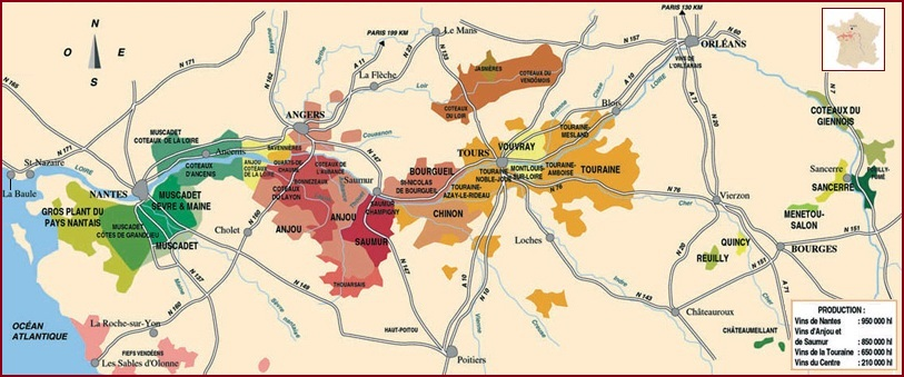 Vineyard in the Loire Valley Vignobles de la vallée des Châteaux de la Loire